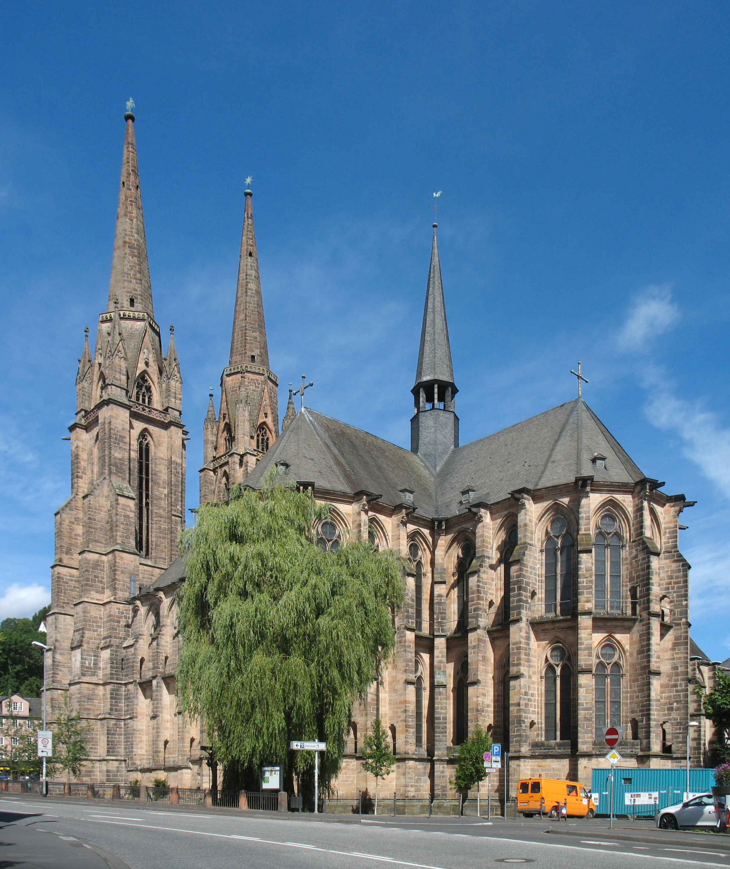 Elisabethkirche in Marburg